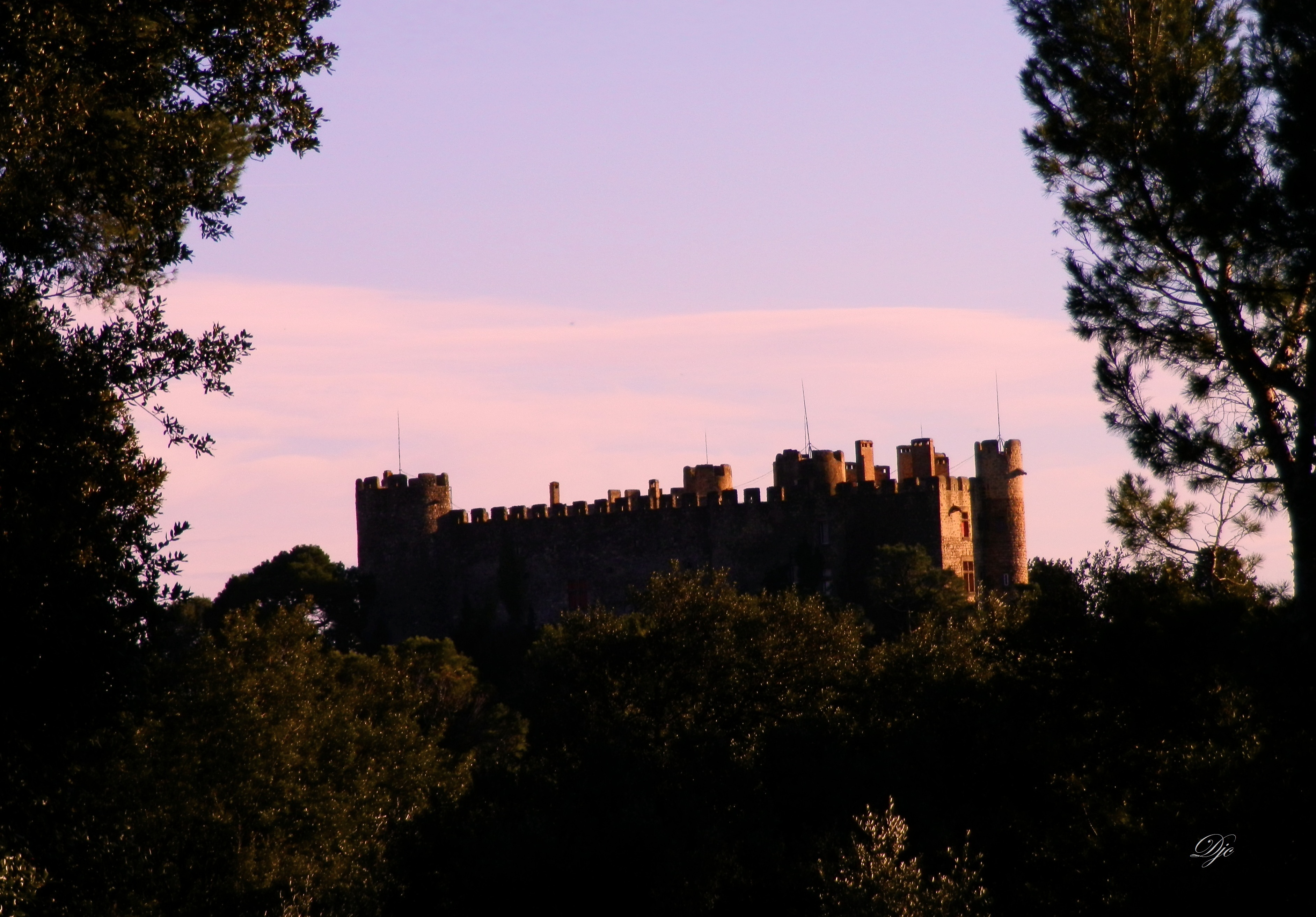 Chateau fort féodal de Montfaucon (Gard)